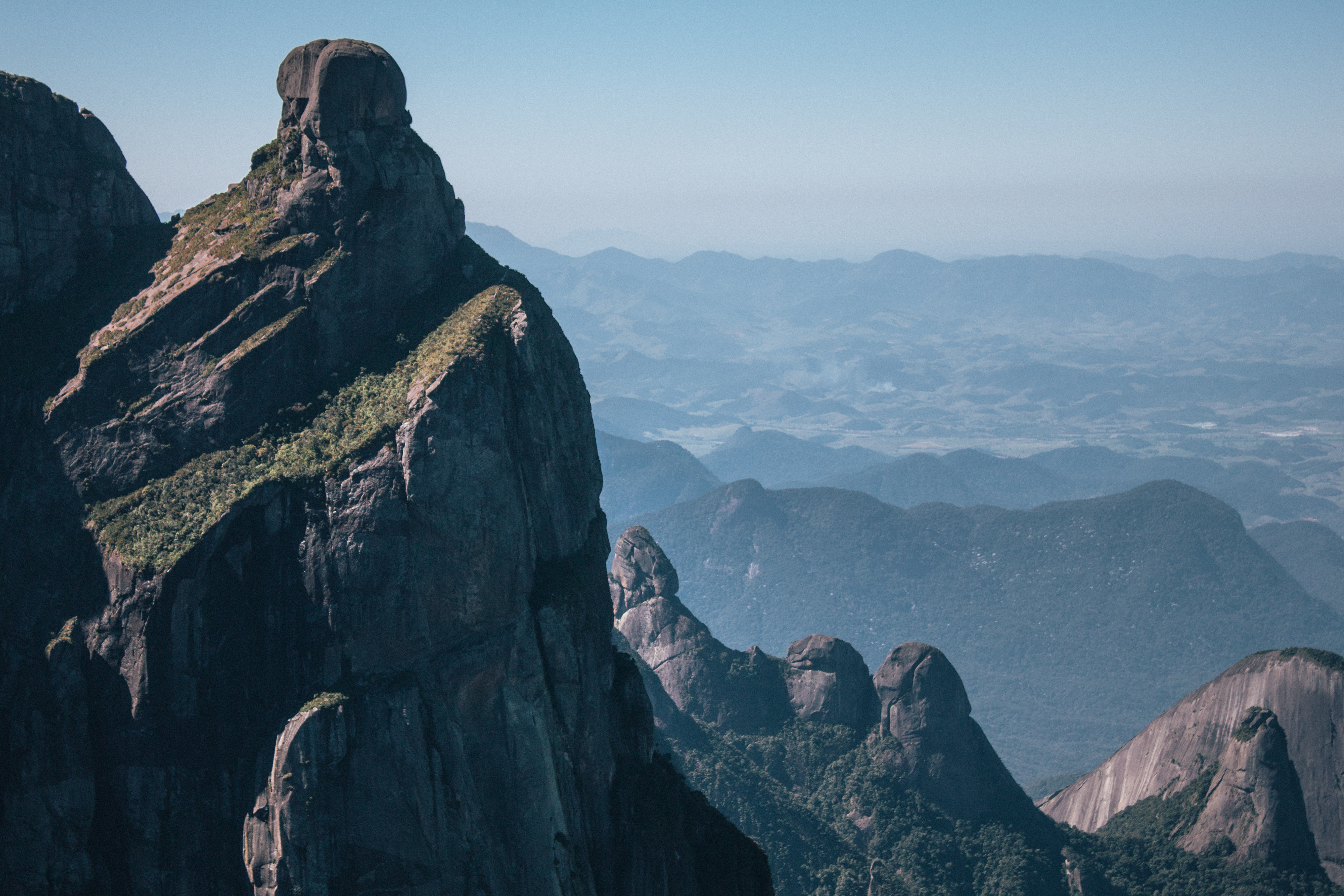 Horizonte rumo à Pedra do Sino